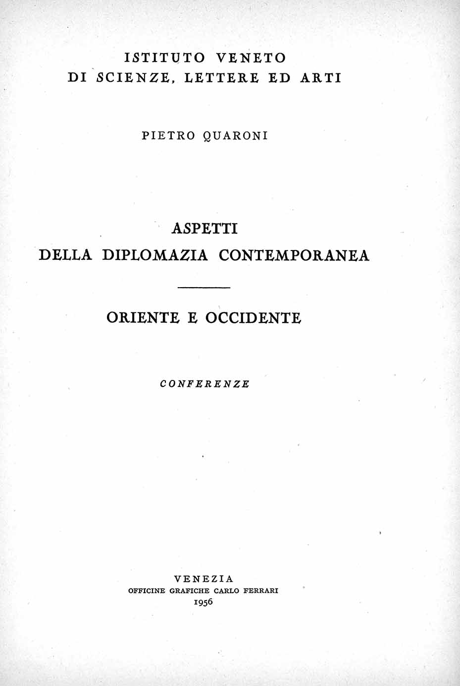 Aspetti della diplomazia contemporanea ; Oriente e occidente : conferenze / Pietro Quaroni. - Venezia : Officine grafiche Carlo Ferrari, 1956. - 60 p. ; 25 cm .